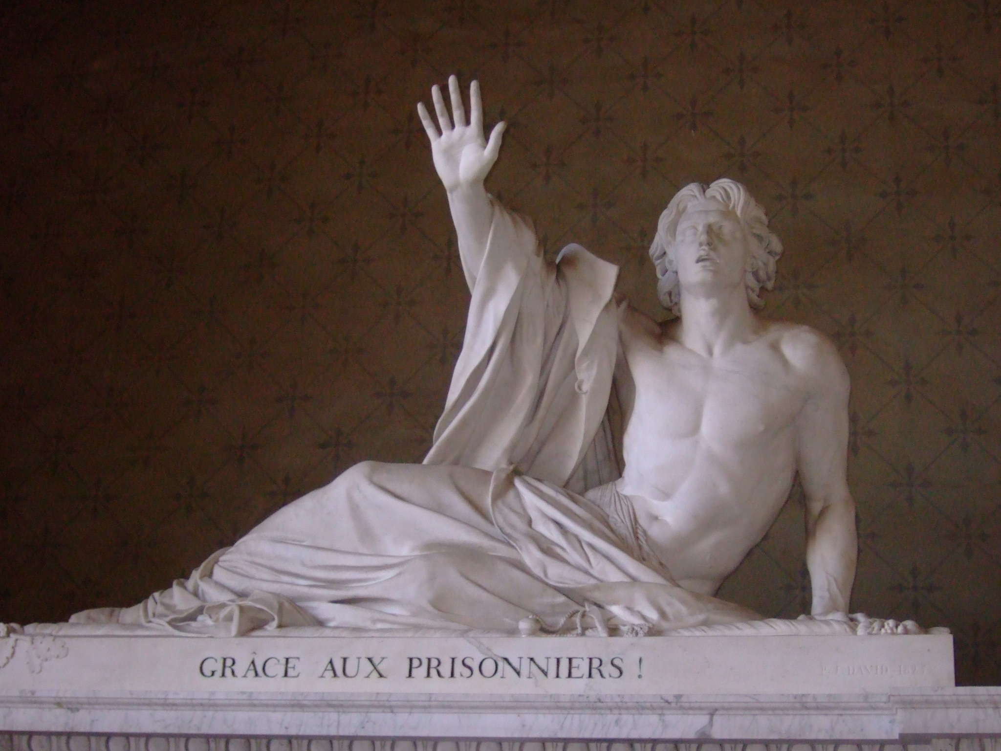 Le "pardon de Bonchamps" de David d'Angers, dans l'abbatiale de Saint-Florent-le-Vieil